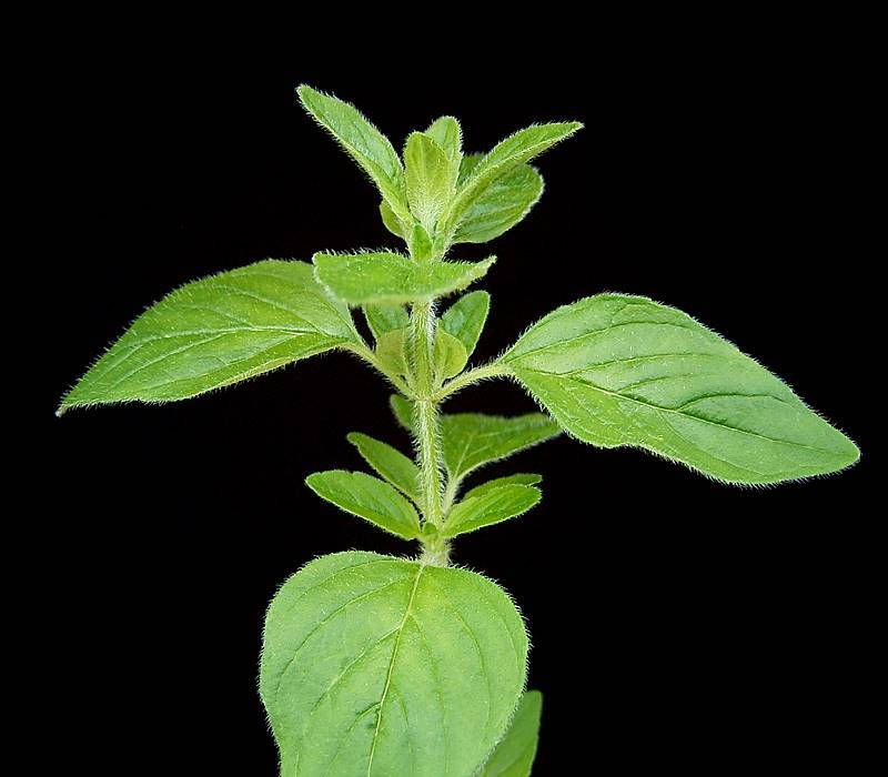 Origanum vulgare